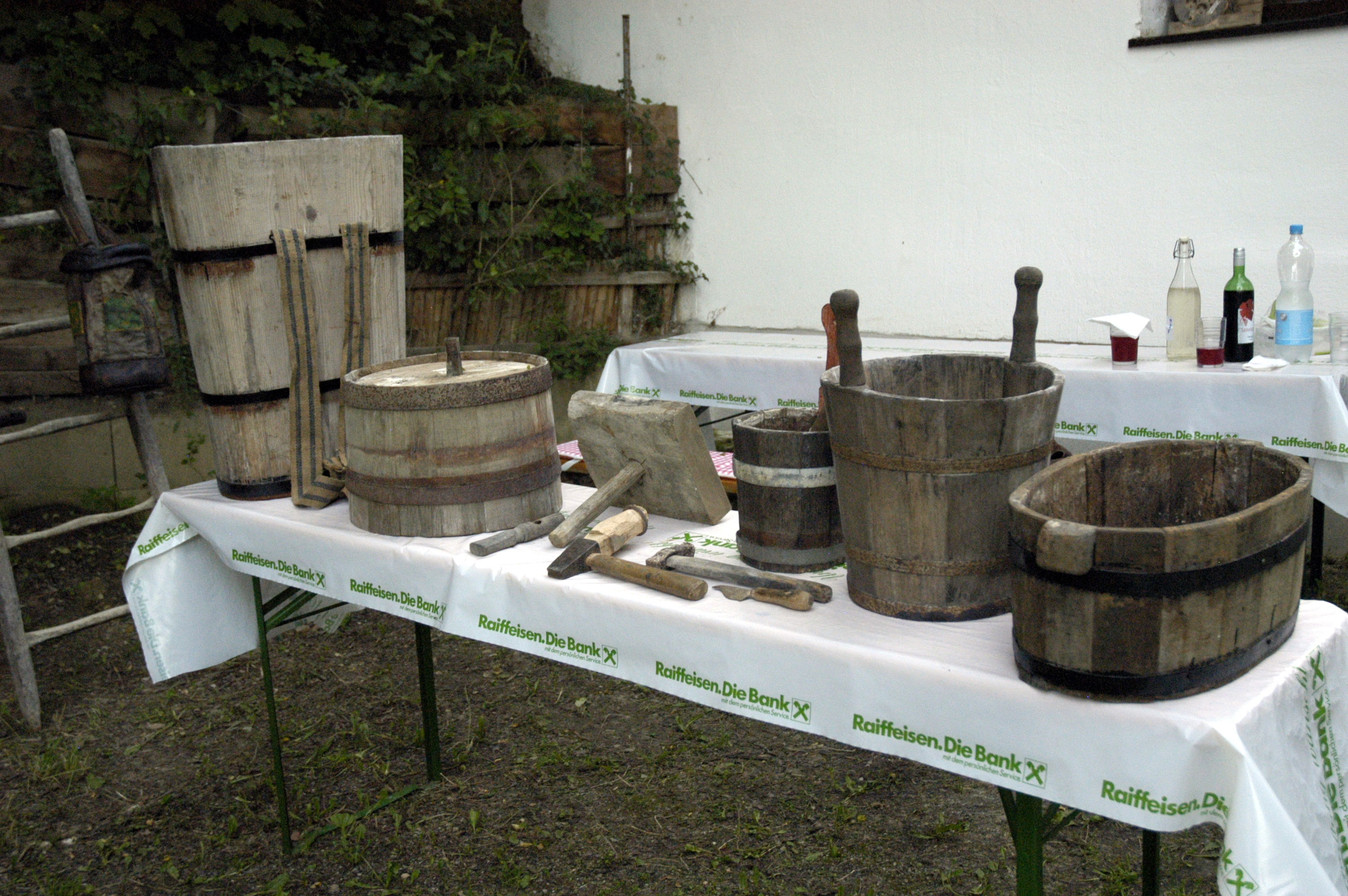 Altes Winzergerät